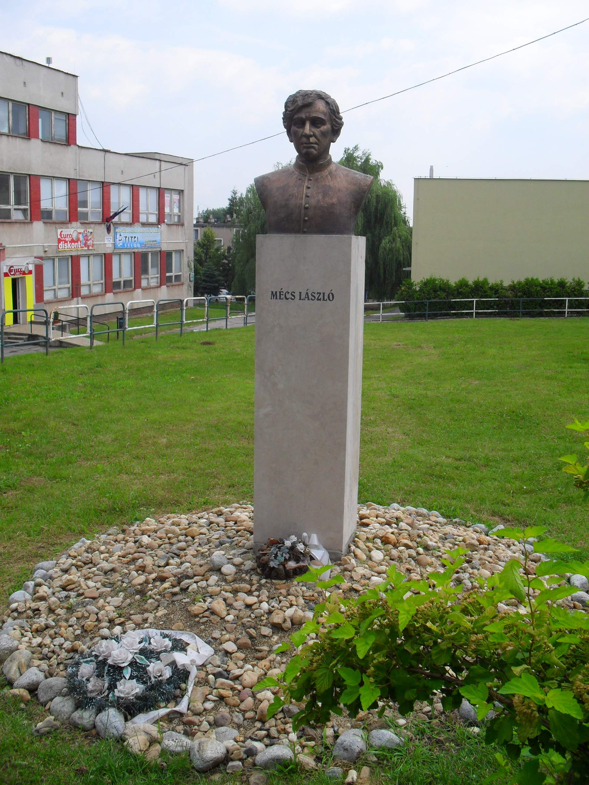 Királyhelmec - Mécs László mellszobra